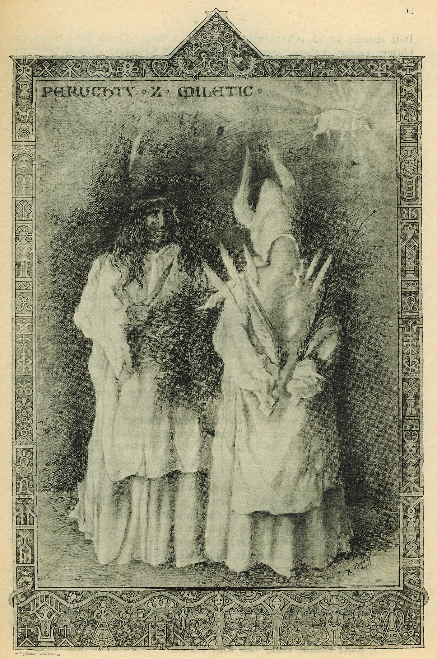 Перучта (Перхт, cs. Peruchty; en. Perchta)